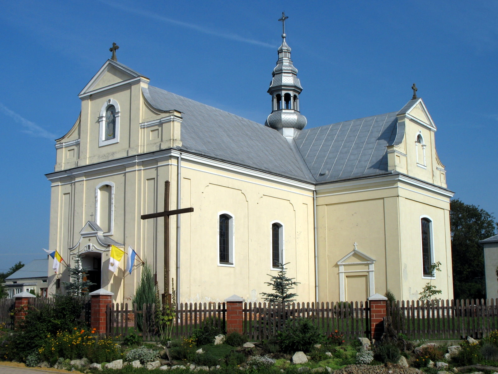 Stary Dzików (Poland), church